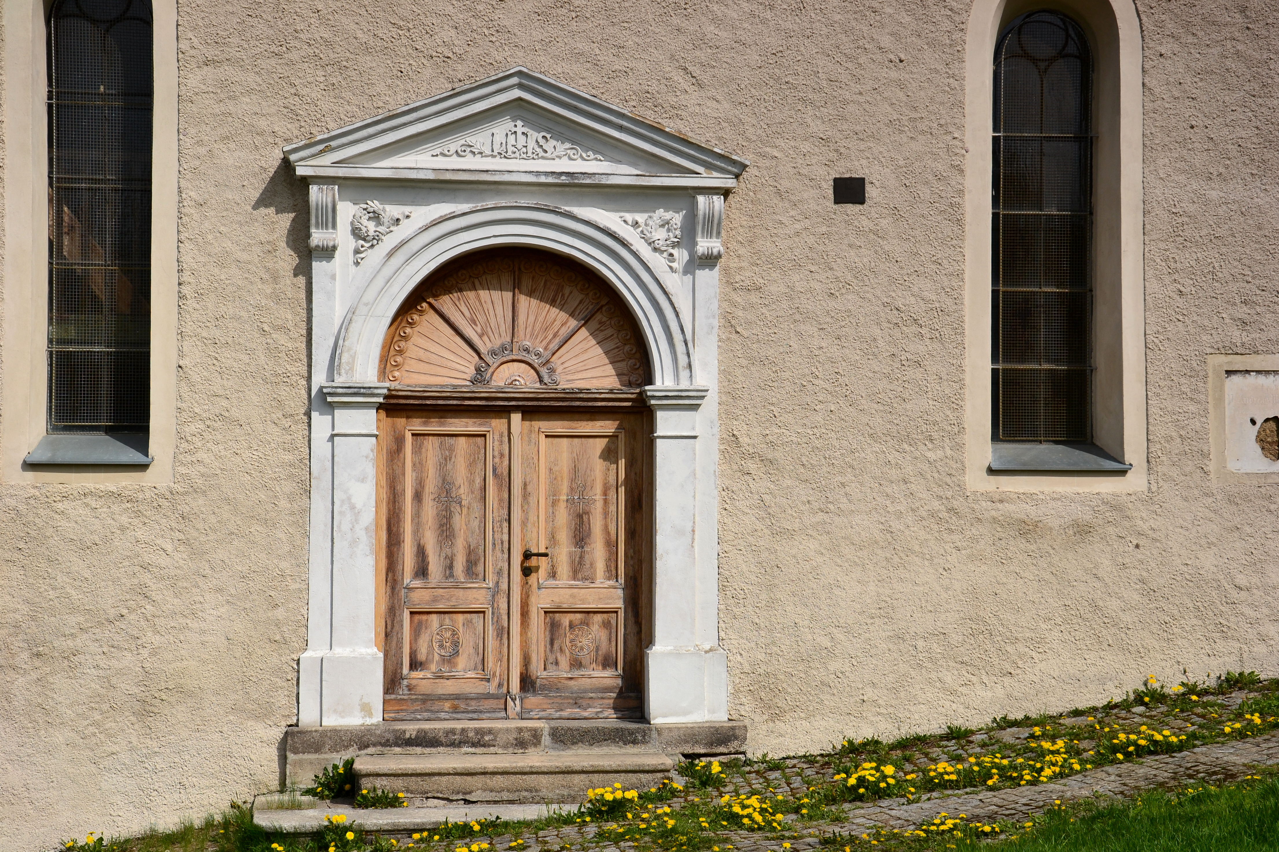 Hřbitovní kostel svatého Martina, ulice Bedřicha Smetany, Vejprty.